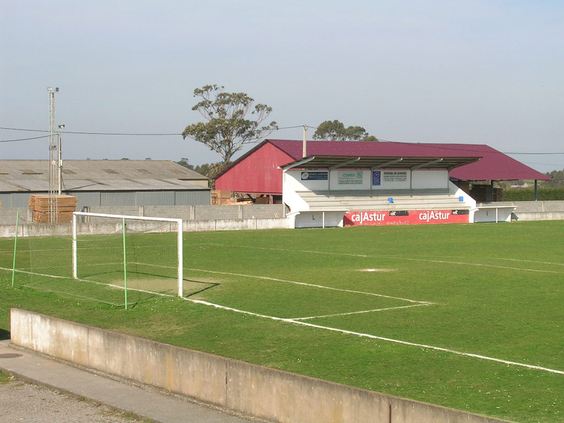 Campo Municipal de Coaña